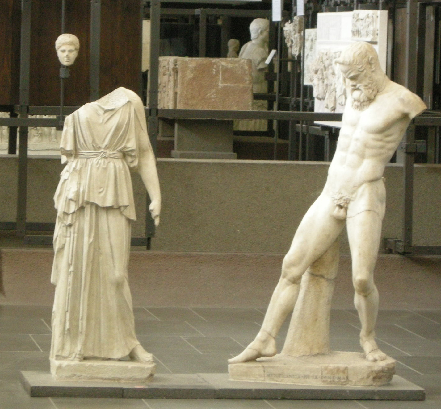 Mirone, athena e marsia, copia romana di originale greco del 450 ac. circa